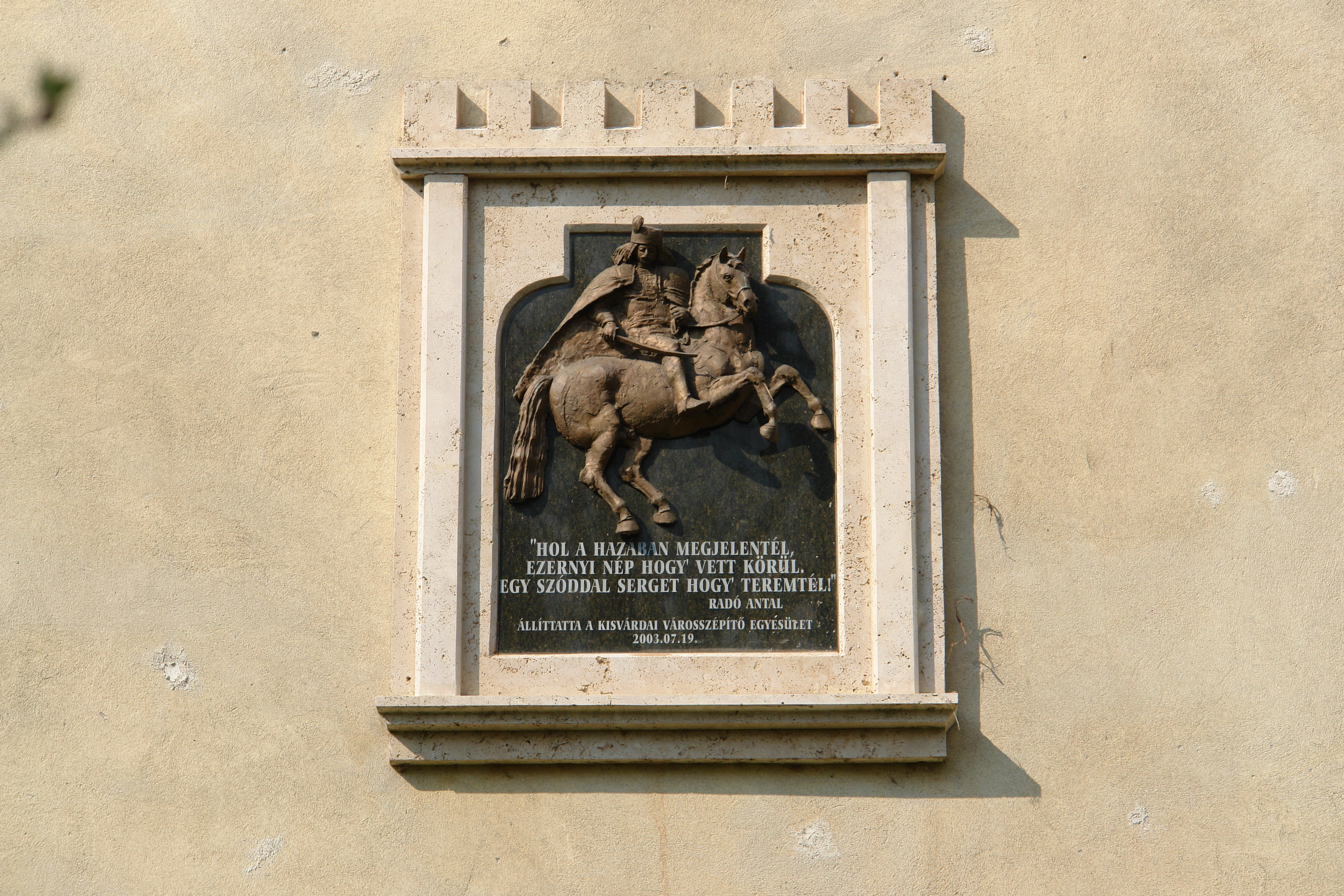 vár... This is a photo of a monument in Hungary. Identifier: 8280